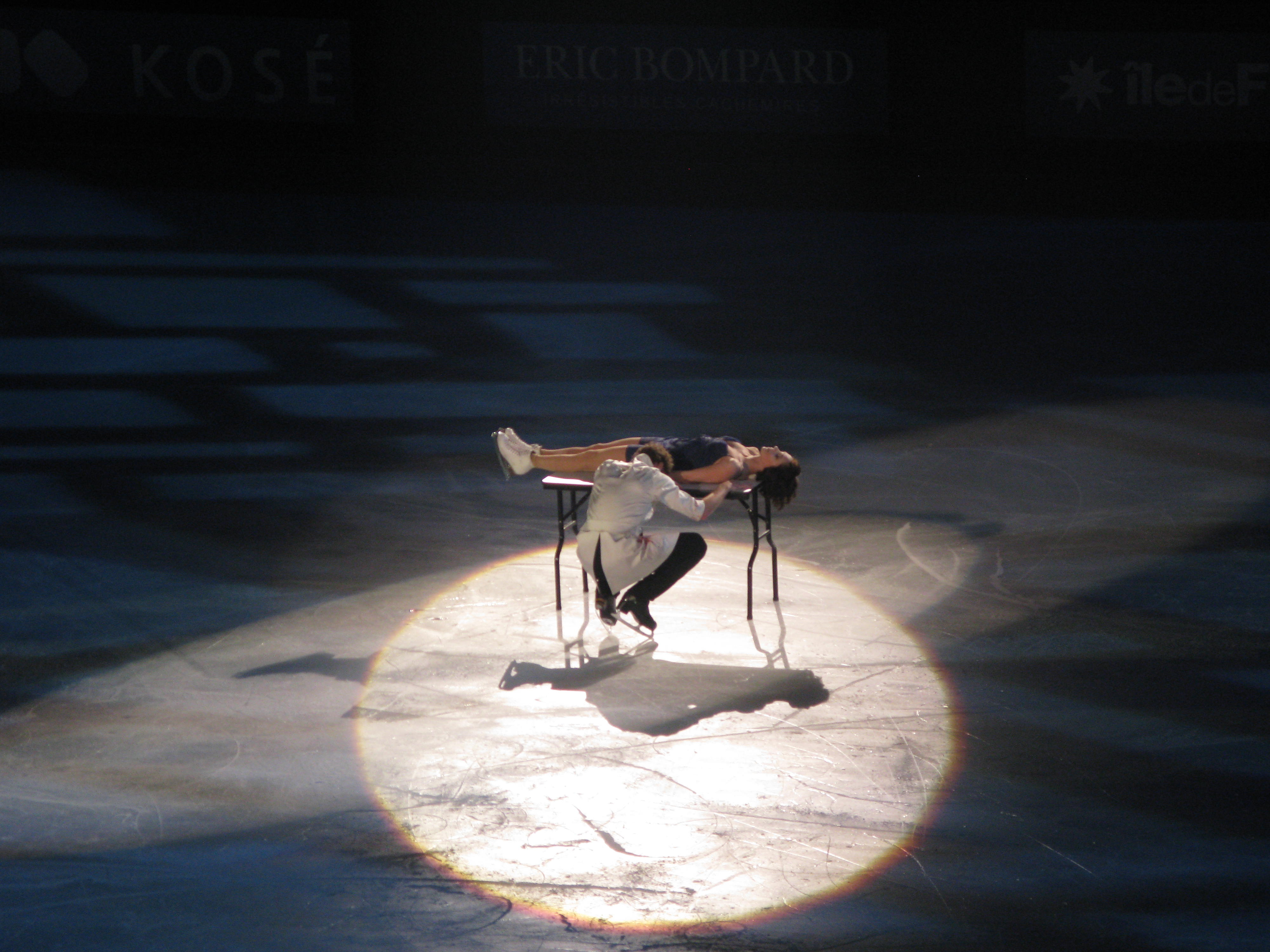 Nathalie Péchalat et Fabian Bourzat lors du gala du trophée Éric Bompard 2013 à Paris-Bercy.